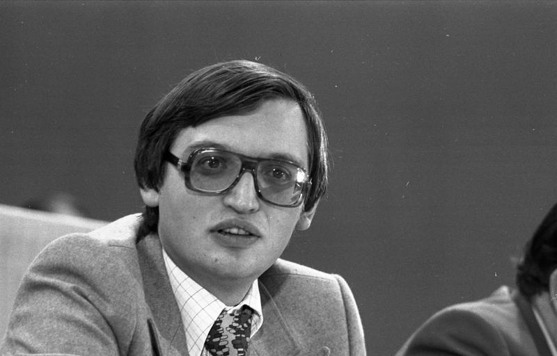 28. Ordentlicher Bundesparteitag der FDP in der Kieler Ostseehalle (Verheugen) 6.-8.11.1977